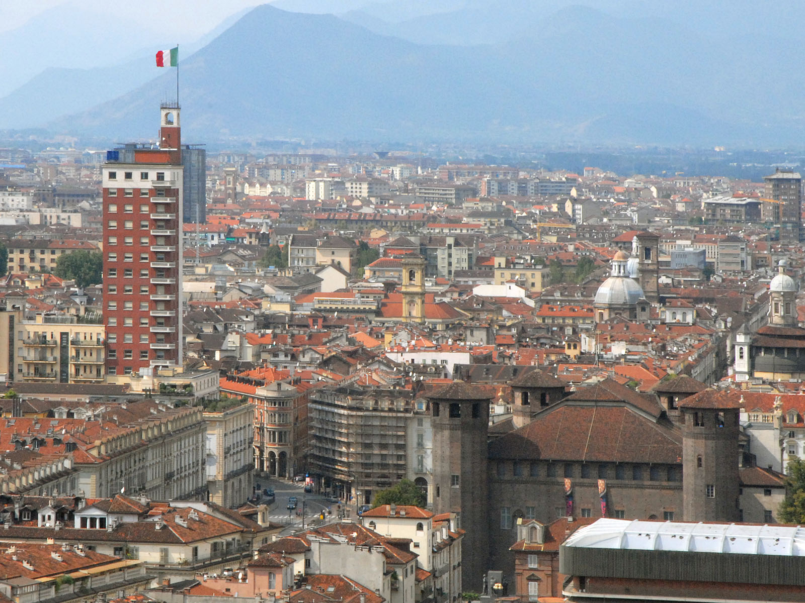 Vue sur Turin depuis la Mole Antonelliana. Au premier plan, la place du château (piazza Castello et palazzo Madama), sur la gauche, le bâtiment rouge qui domine la place date de l'époque mussolinienne (1933-1934), c'est la "Torre Littoria" (19 étages, 109 mètres) également appelé "le doigt de Mussolini". L'architecte : Armando Melis l'avait conçu pour accueillir le siège du parti national fasciste.